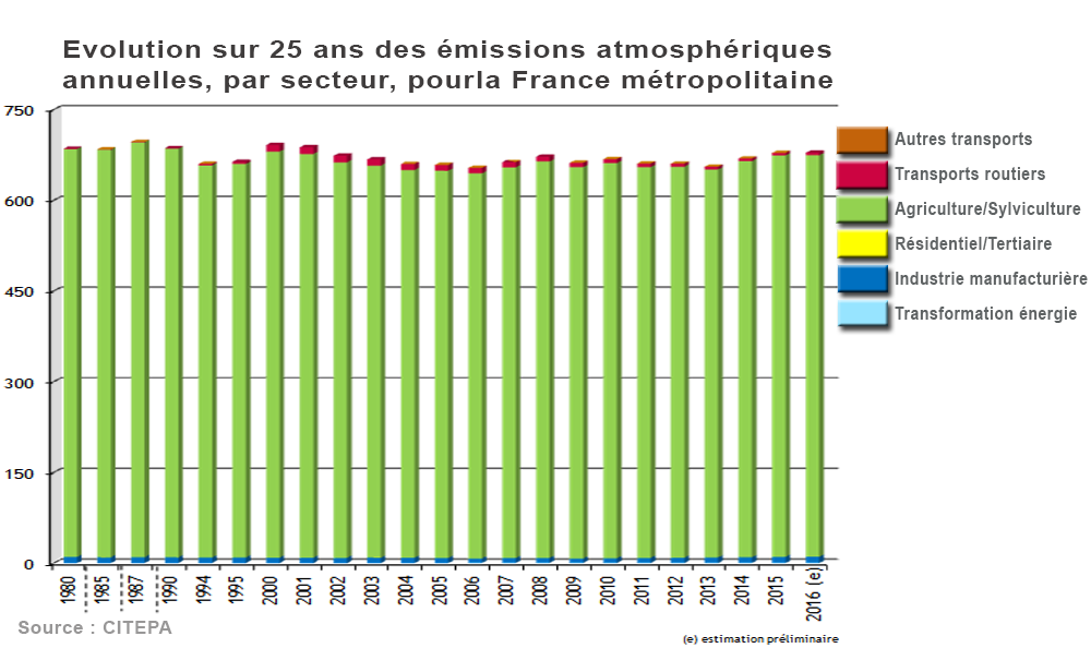 L'ammoniac n’est que l’un des polluants azotés de l'air, mais il fait l'objet d'un suivi particulier (par le CITEPA en France) en tant que précurseur d’autres polluants affectant les écosystèmes, le climat (indirectement, en dégradant les puits de carbone et peut être en modifiant la nébulosité) et la santé humaine. Les objectifs de diminution ne sont pas atteint, à cause principalement de l'intensification/industrialisation de l'agriculture et en partie parce que d'autres polluants (SOx) ont diminué et qu'ils dégradaient antérieurement une partie plus importante de l'ammoniac injecté par les activités humaines dans l'air. Les incendies de forêt sont aussi une source préoccupante car susceptible de croître avec le réchauffement climatique qui par ailleur accélère la désorption de l'ammoniac piégé dans les sols et dans l'eau. rem : Ce graphe montre une situation comparable à celle de l'Allemagne. L'agriculture est de loin la première source d'ammoniac dans le monde, à cause de l'industrialisation de l'élevage et de l'utilisation croissante d'engrais azotés chimiques. Les engrais verts (plantes vivant en symbioses avec des bactéries captant l’azote de l’air) permettent d’utiliser moins de nitrates et d'ammoniac. Un élevage plus extensif produit moins d’ammoniac.